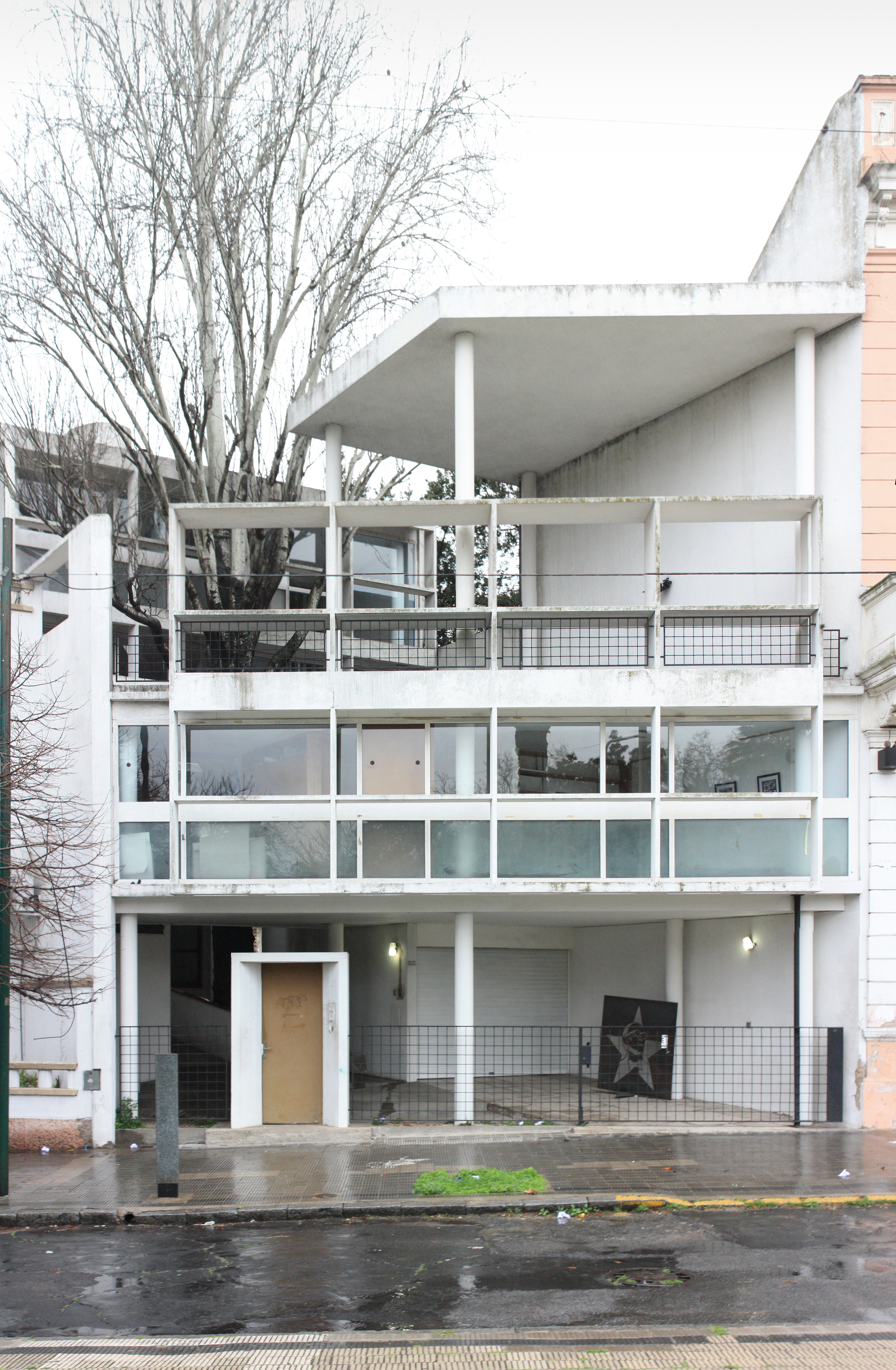 Casa Curutchet